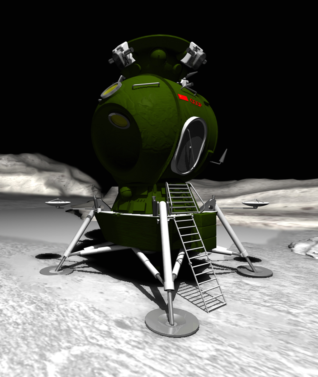 N-1 Herkules, Entwicklung einer Trägerrakete; Dr. Olaf Przybilski, Stefan Wotzlaw Urheber Eberhard Marx 08.10.2008 Einstellung durch den Urheber, extra Genehmigung nicht notwendig